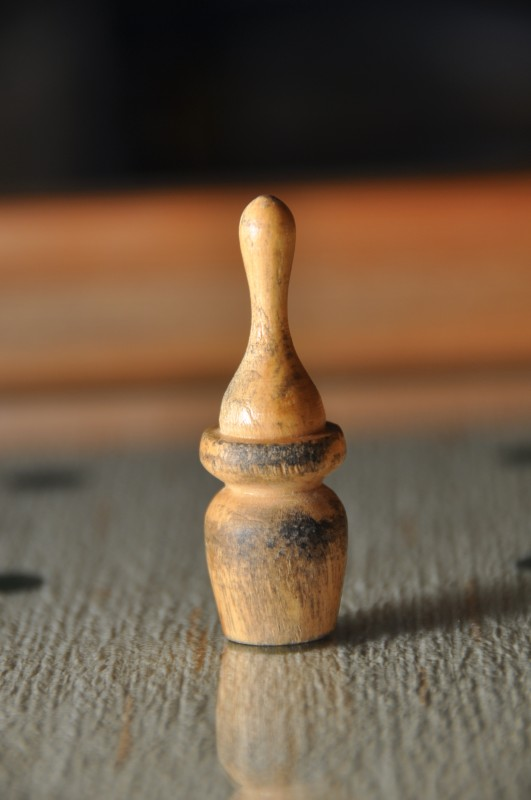 Kegel des Tischkegelspiels